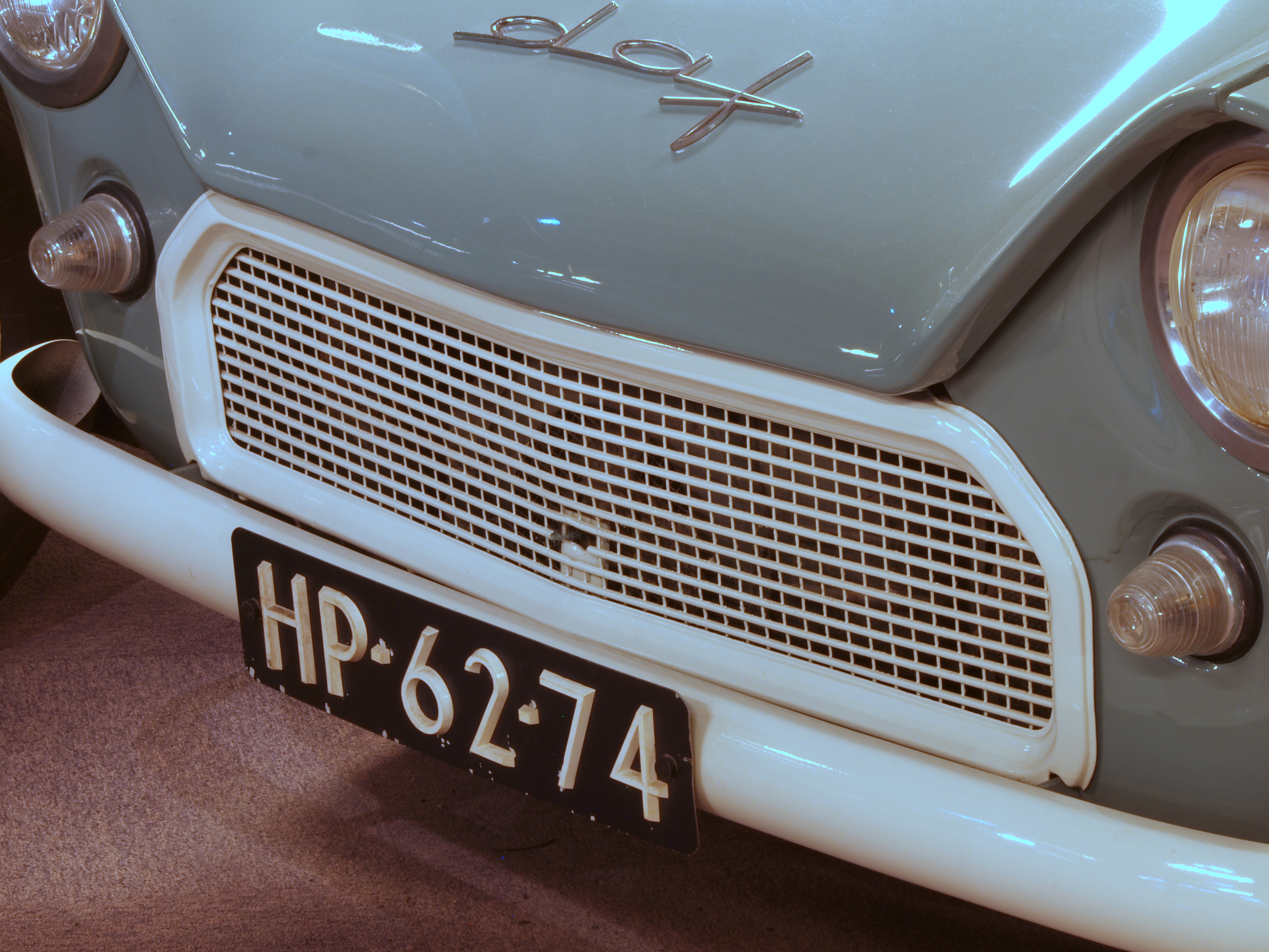 DAF museum